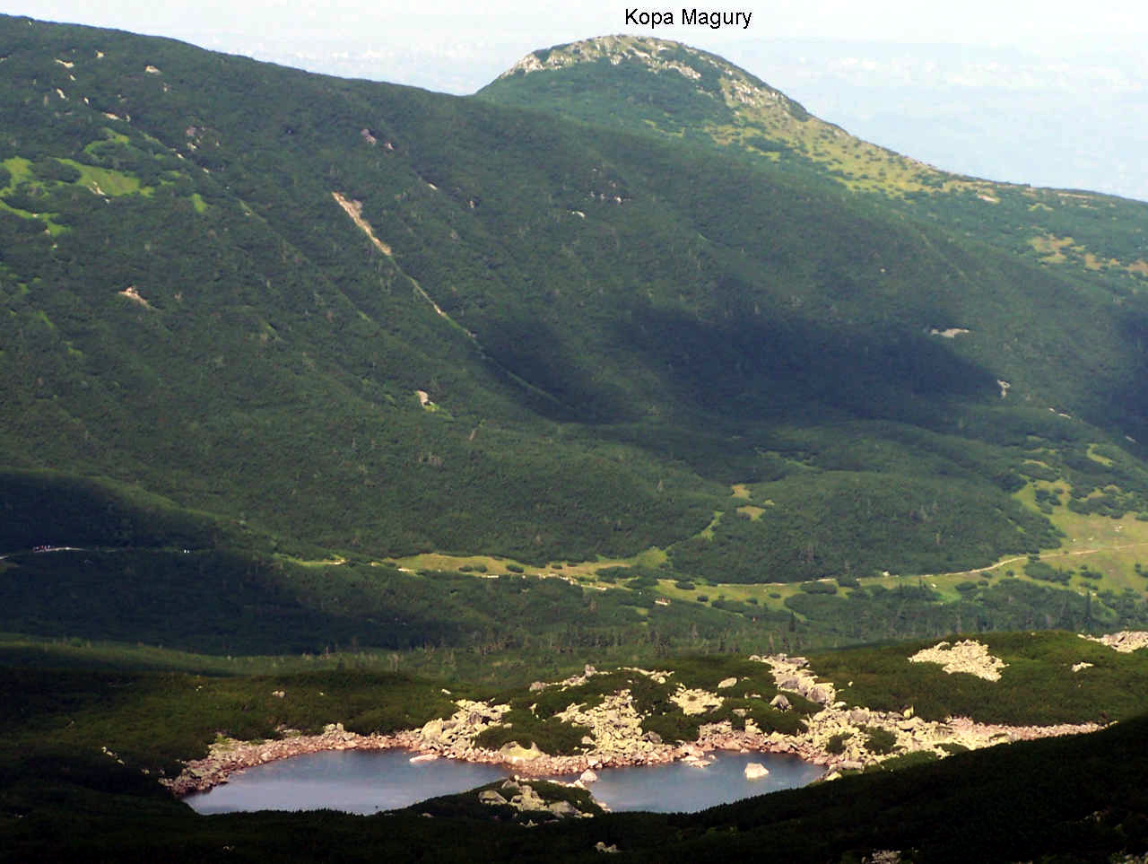 Kopa Magury (Tatra Mountains)